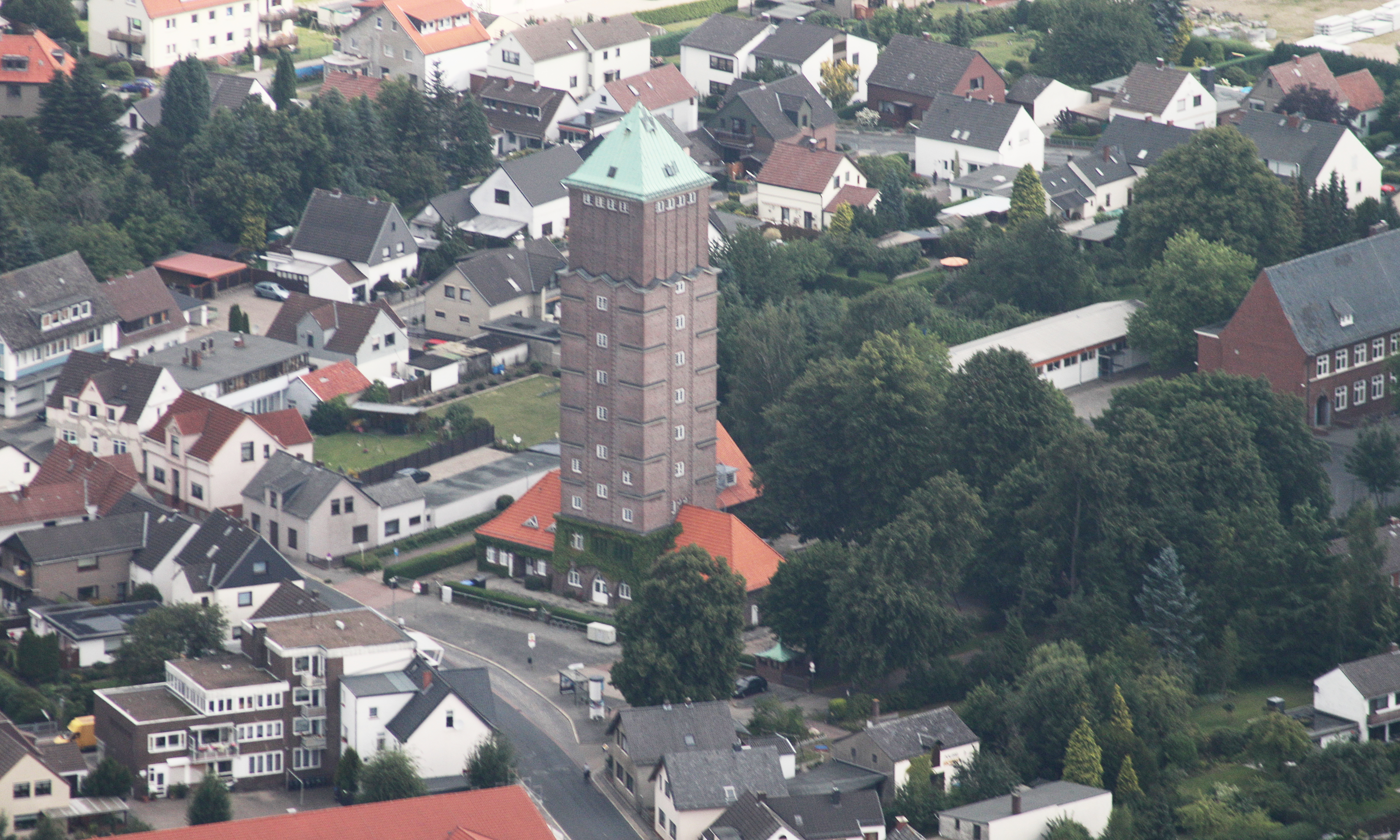 Wasserturm Blumenthal; Bremen Nord; Fotoflug Bremen; Flughöhe 500 m; Luftbilder Bremen-Nord: vom U-Boot Bunker Valentin bis Vegesack ; Flug entlang der Weser von West nach Ost, über dem linken Weserufer, mit Blickrichtung zum rechten Weserufer